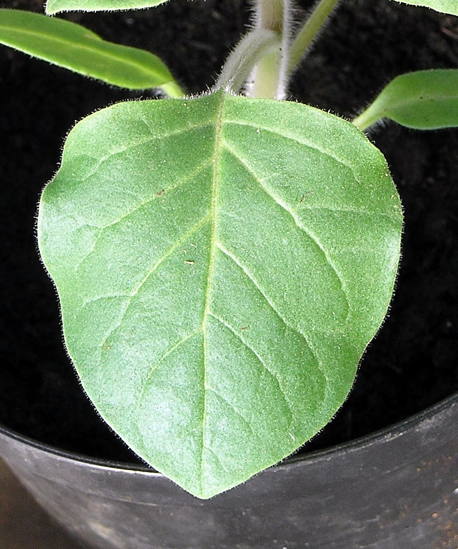 Ogaõuna leht.